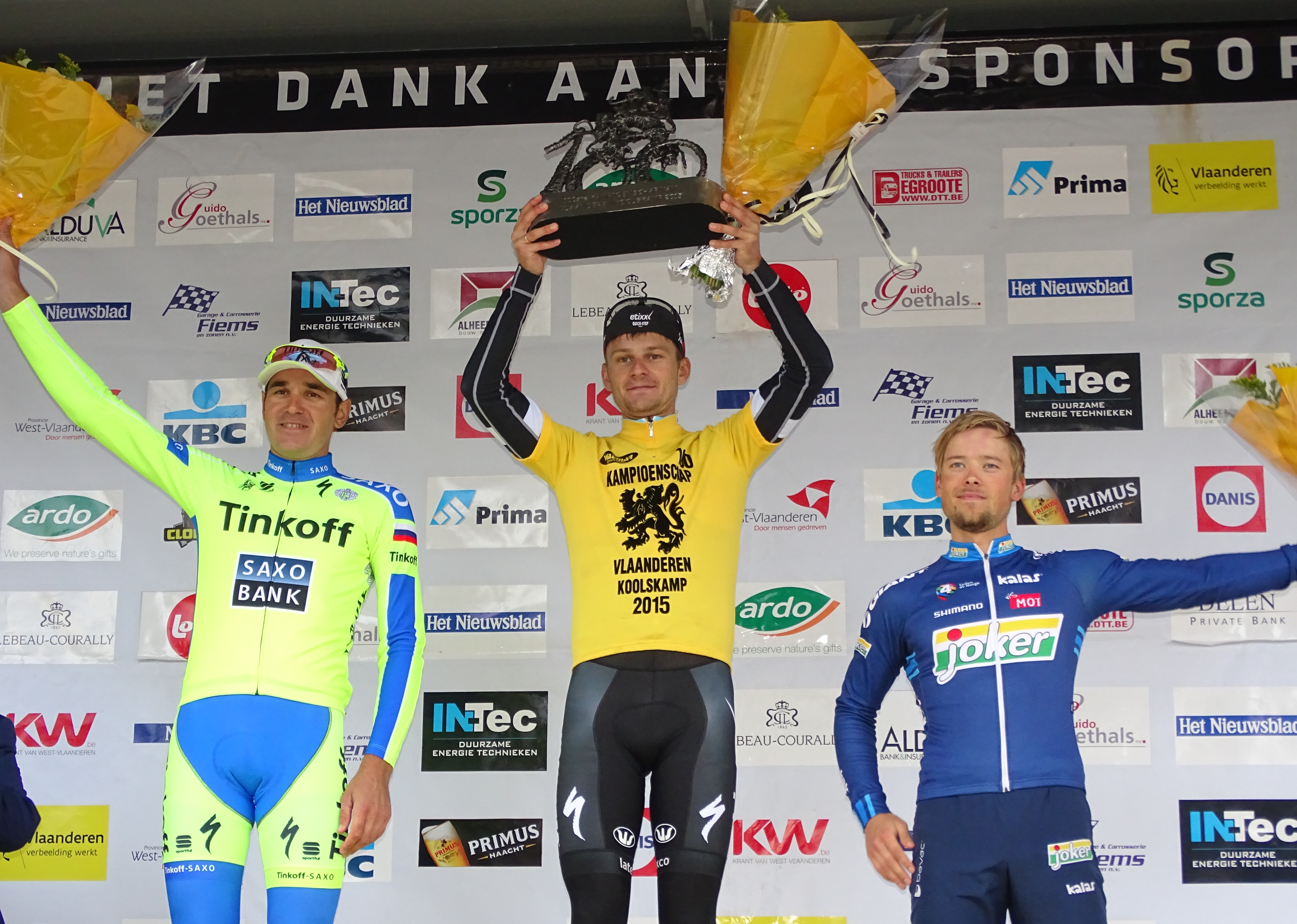 Reportage réalisé le vendredi 18 septembre à l'occasion de l'arrivée du Championnat des Flandres 2015 à Koolskamp (Ardooie), Belgique.